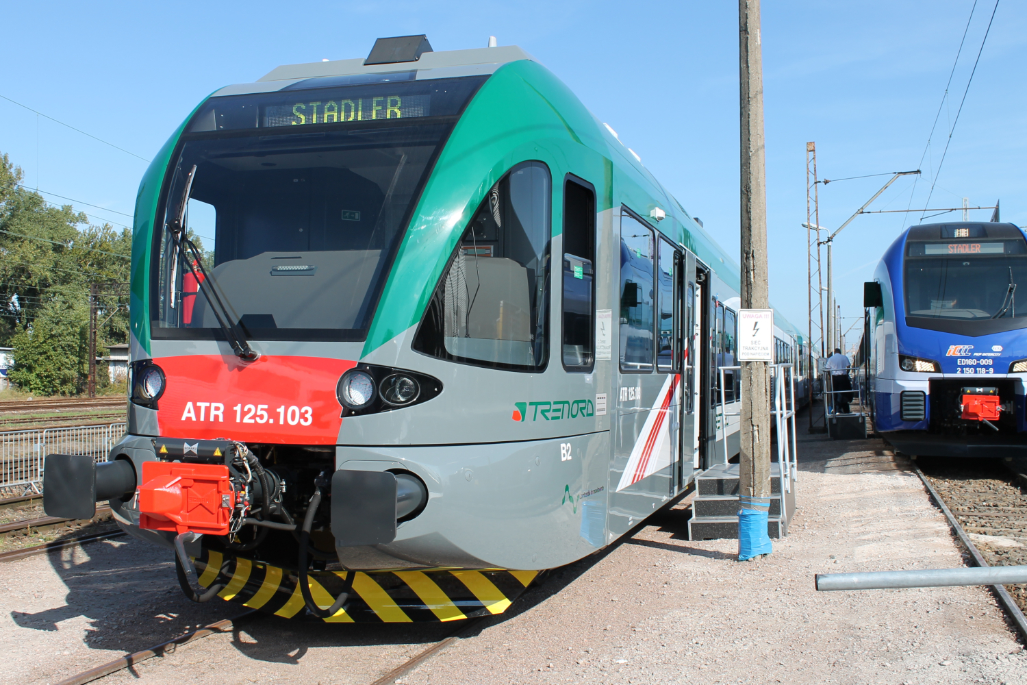 Spalinowy zespół trakcyjny ATR125.103 podczas targów Trako 2015. The making of this document was supported by Wikimedia Polska Association, within Wikigrant no. WG 2015-34.